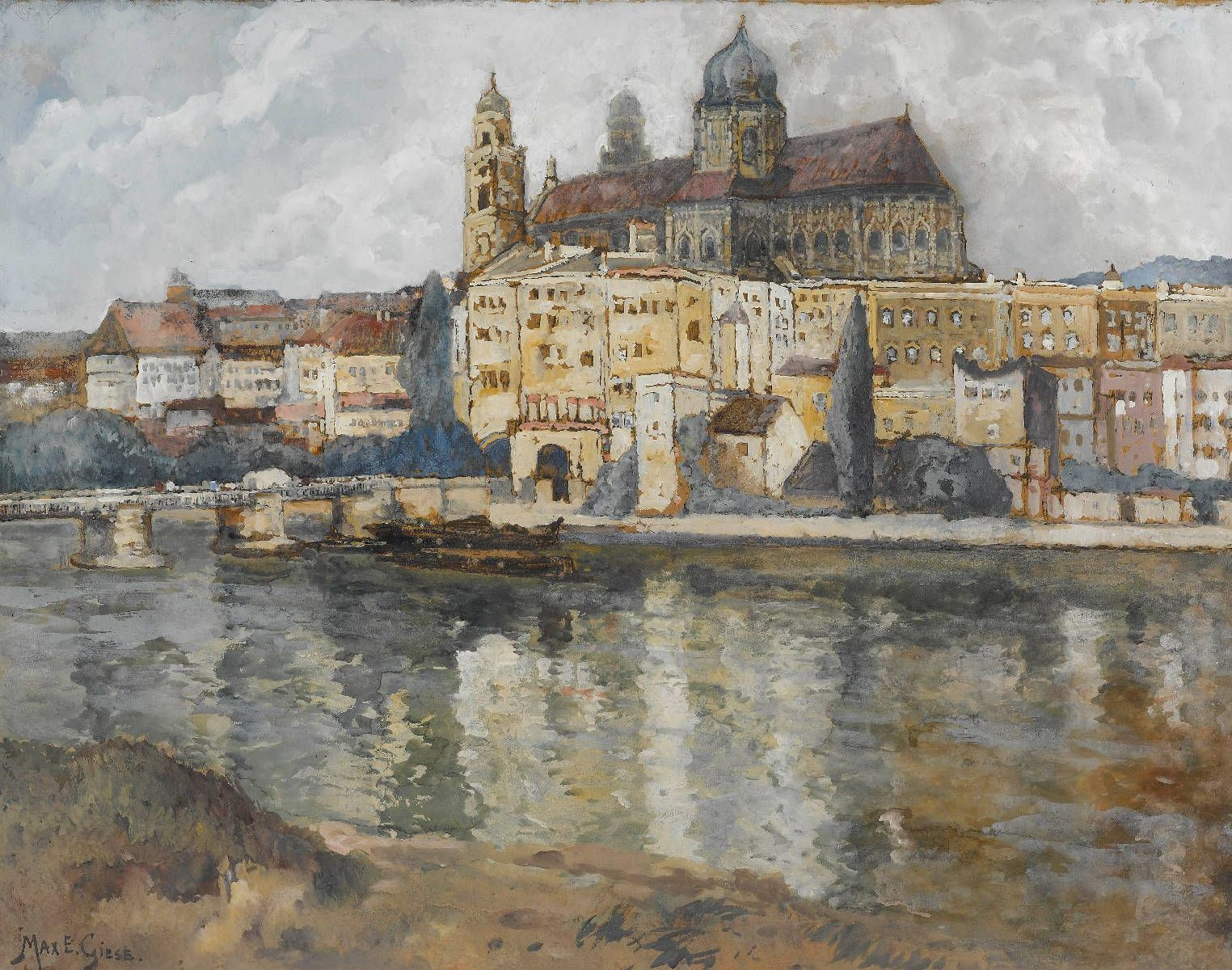 Blick auf den Stephansdom in Passau. Signiert. Aquarell und Deckfarben. 80 x 101 cm